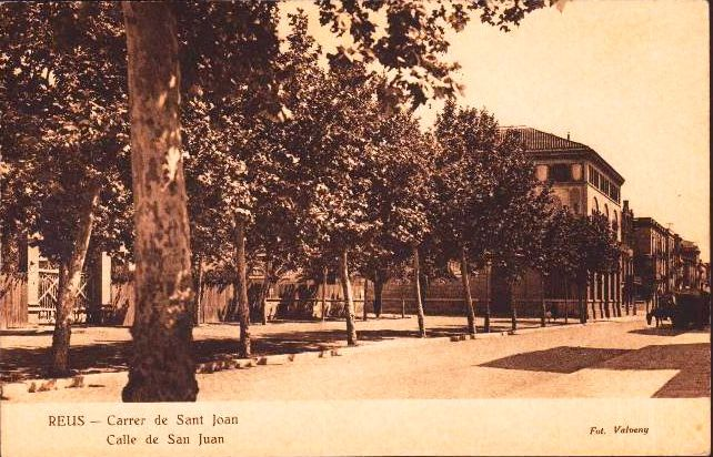 Imatge del carrer de sant Joan de Reus